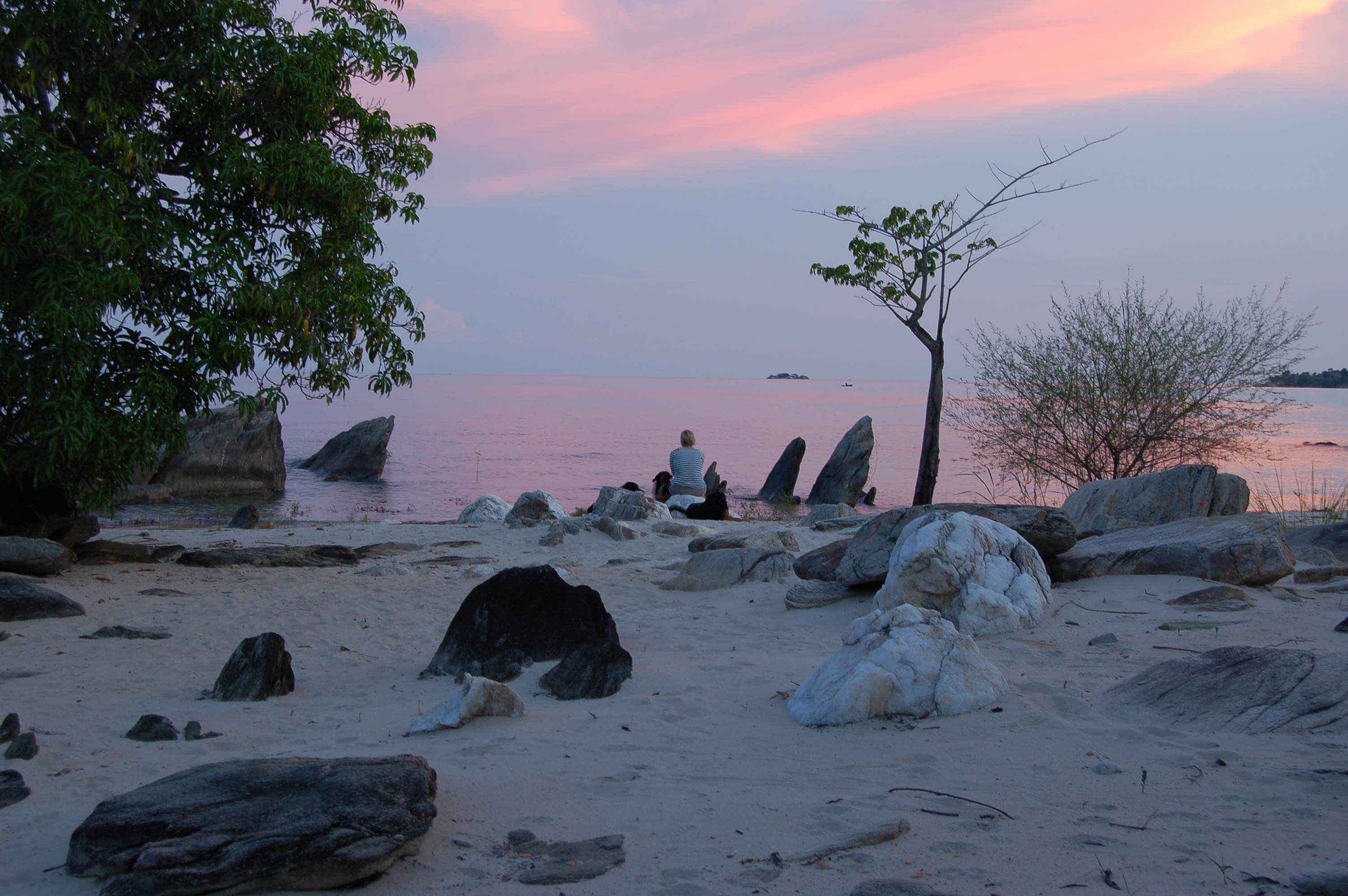 Lake Malawi